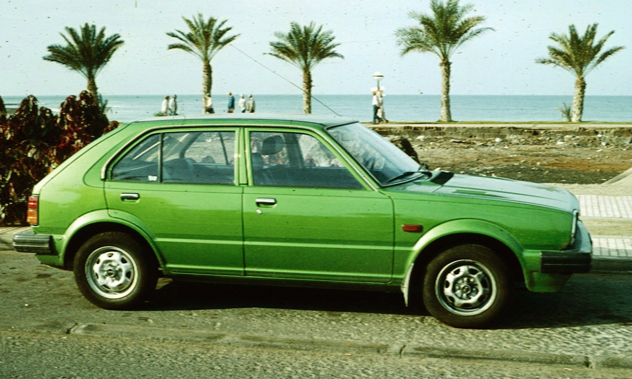 Honda Civic 5 door 1982 version on Tenerife